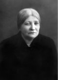 Jadvyga Butkevičienė (Jacunskaitė) apie 1935 m. (iš Jono Butkevičiaus albumo)